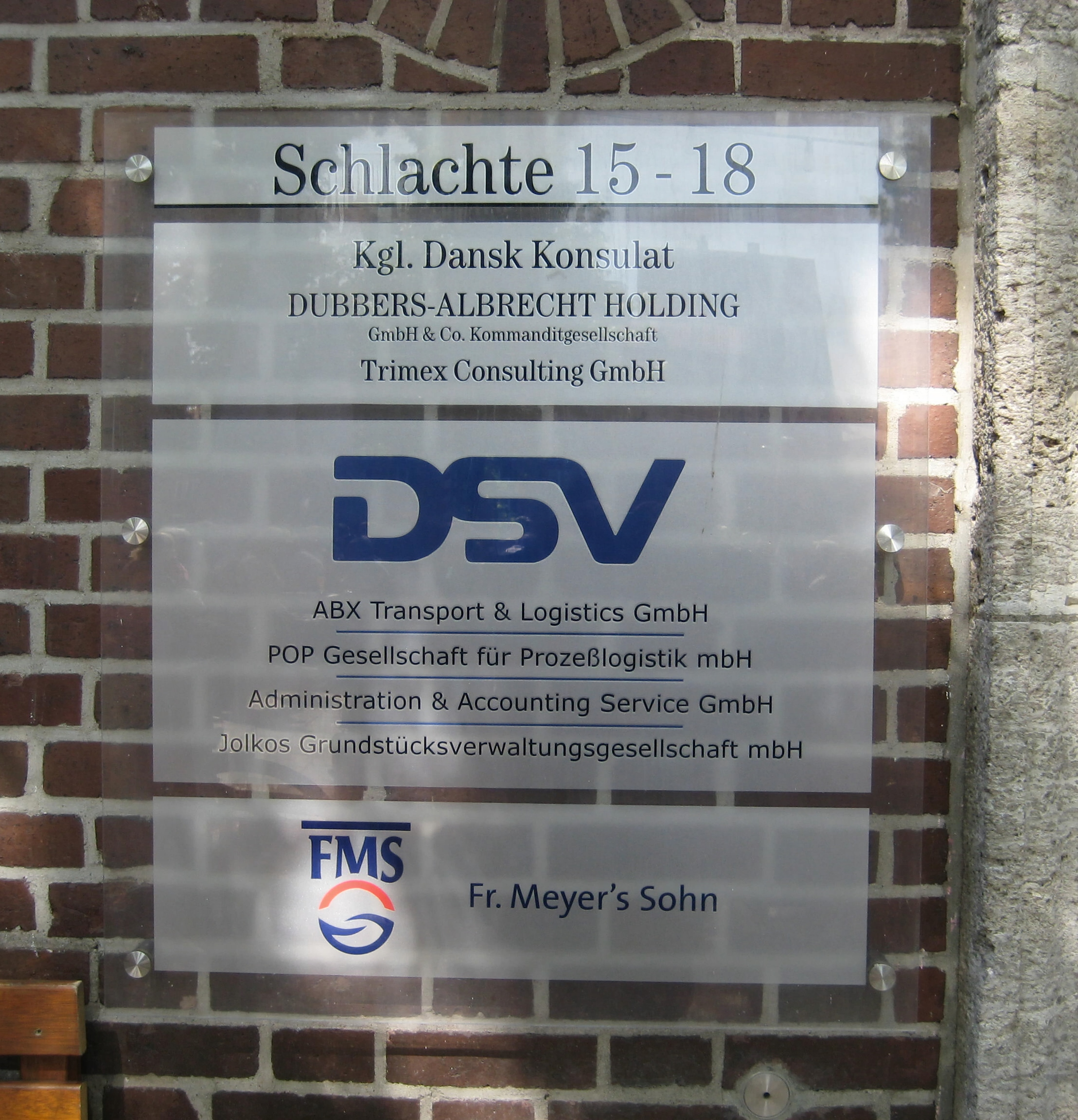 Firmenschild neben dem Eingangsportal des „Bachmann-Hauses“ an der Schlachte 15–18 in Bremen. Früheres Kontorhaus der ehemaligen Bremer Handelsspedition J.H. Bachmann (JHB), 1913 erbaut und nach Kriegszerstörungen 1948 in der alten Form wiederaufgebaut. In dem Gebäude befinden sich heute u. a. Tochterfirmen des dänischen Logistikkonzerns DSV A/S, der JHB Anfang 2006 übernommen und in seine DSV Air & Sea Division integriert hat.